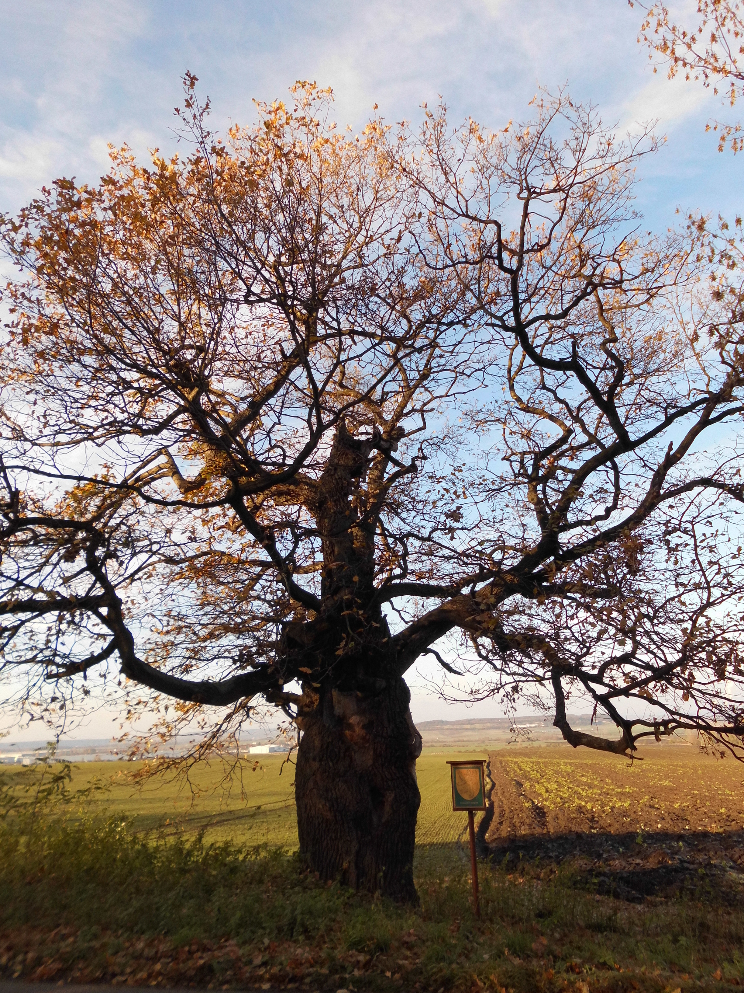 Dub u Postřižína